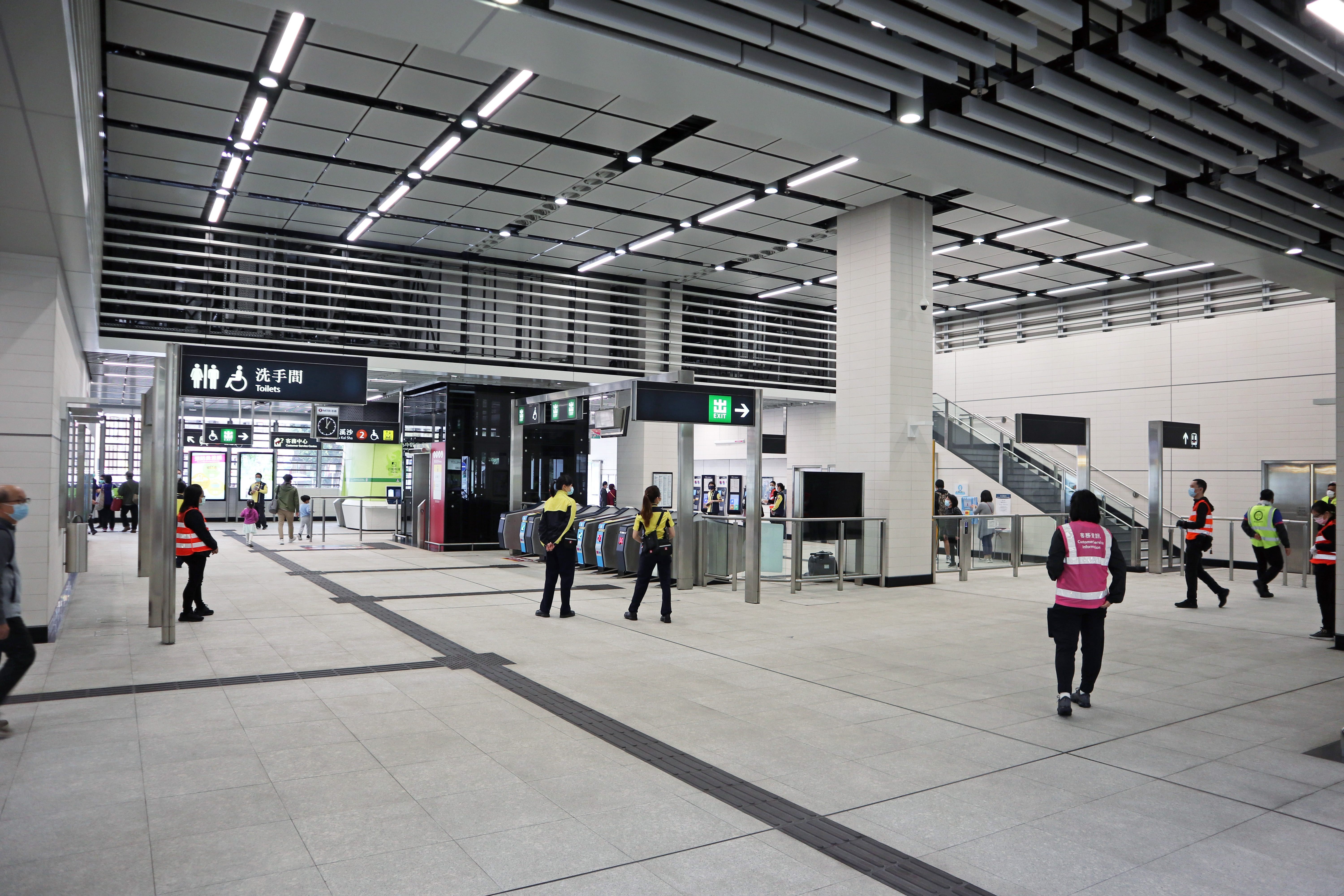 港鐵顯徑站大堂